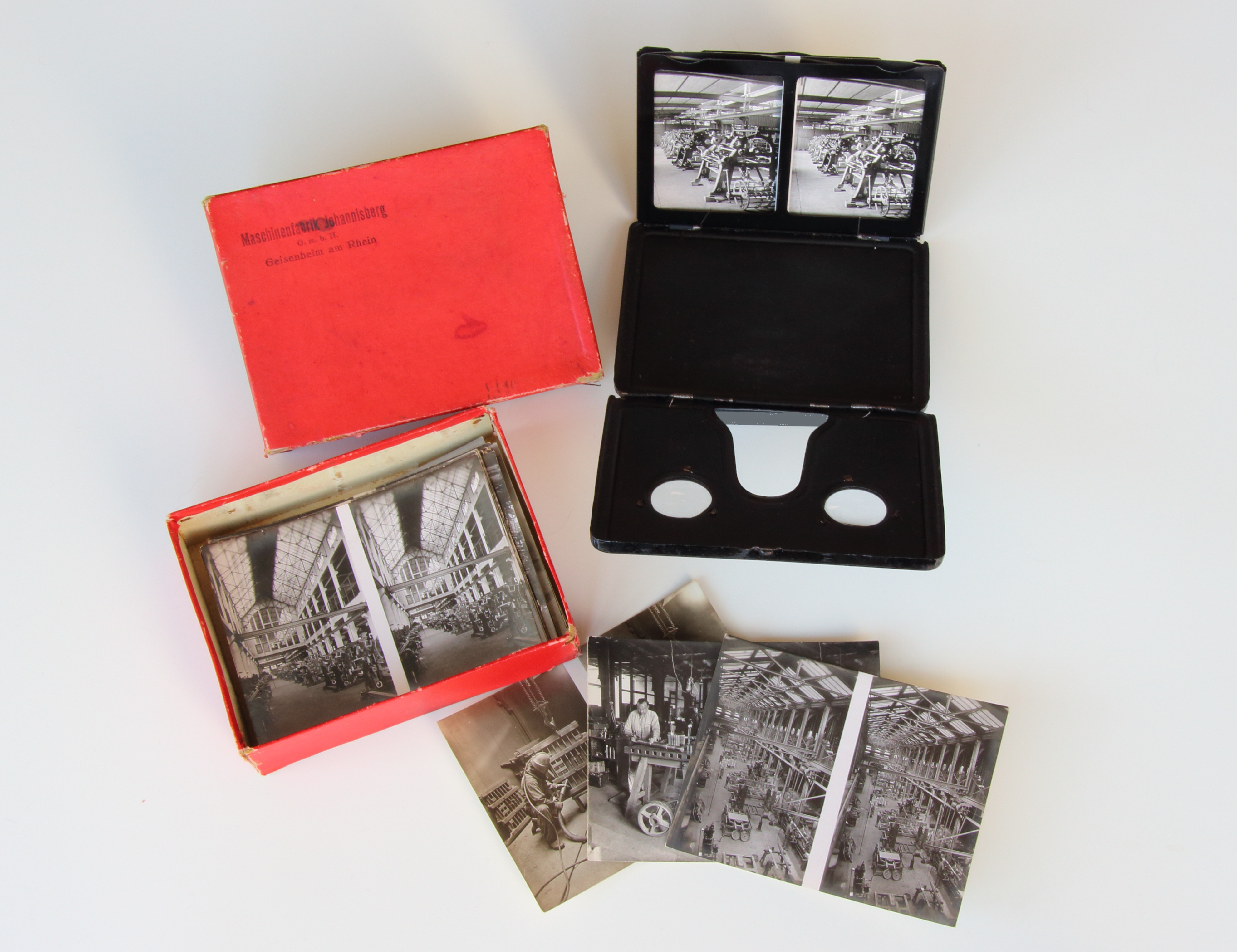 Stereofotografie von Alfred Krauth mit dem Indupor-System. Hier: Maschinenfabrik Johannisberg Geisenheim, 1926